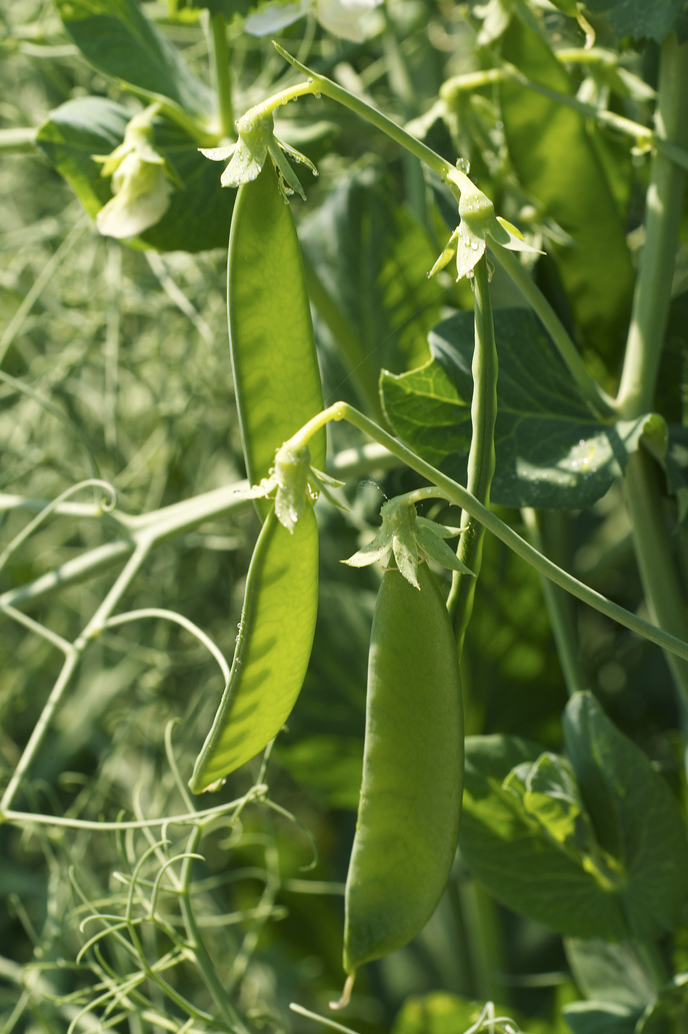 INRA, Jean Weber